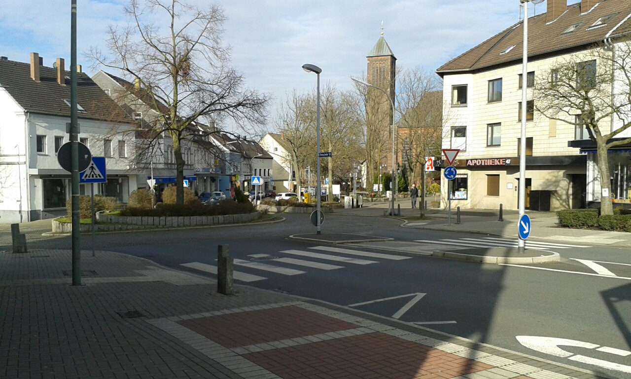 Sicht vom Kreisverkehr Brenscheder Str/Bruchstr/Borgholzstr mit Blick auf die St.Johannes Kirche